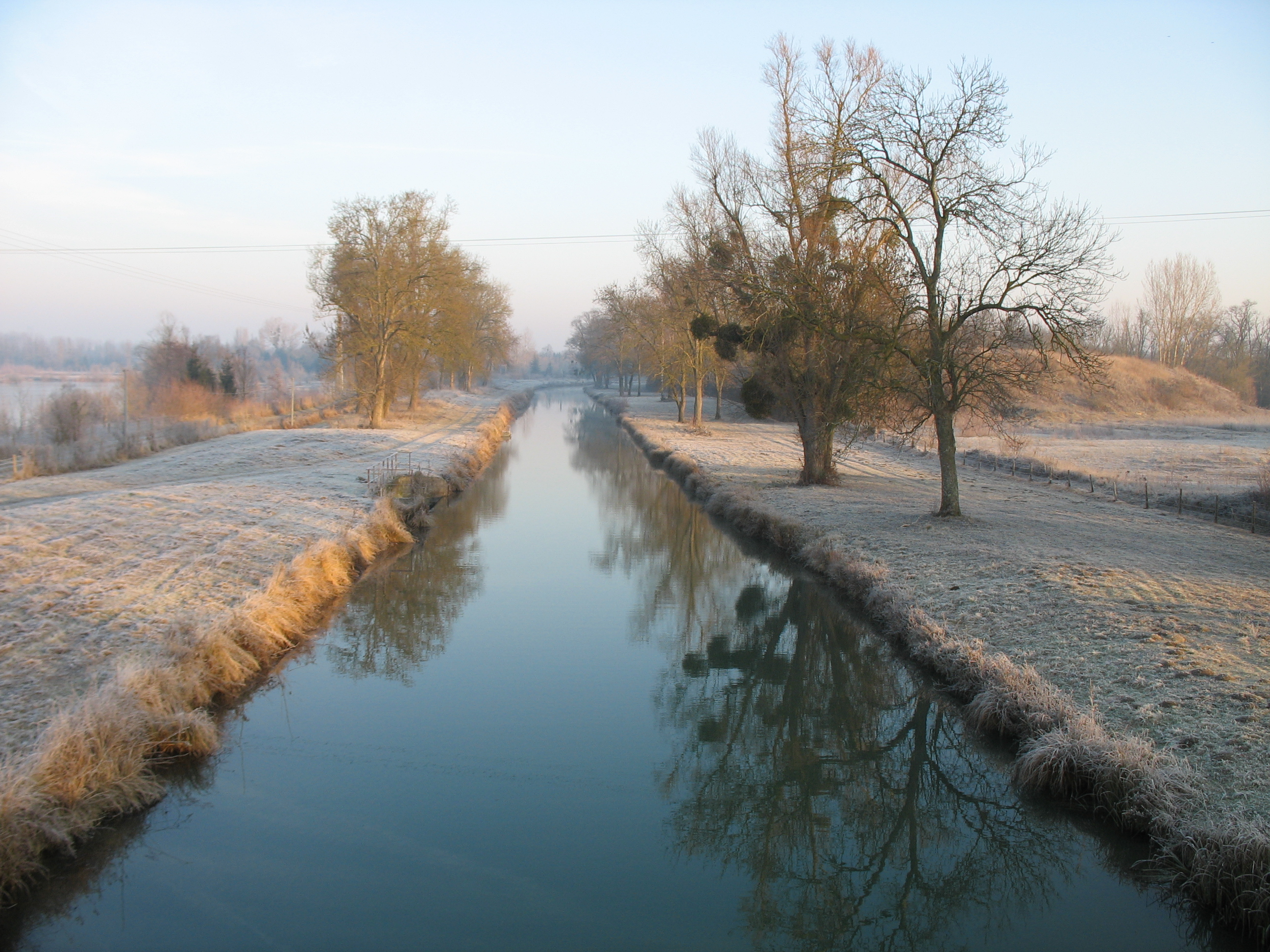 Paysage de la Bassée